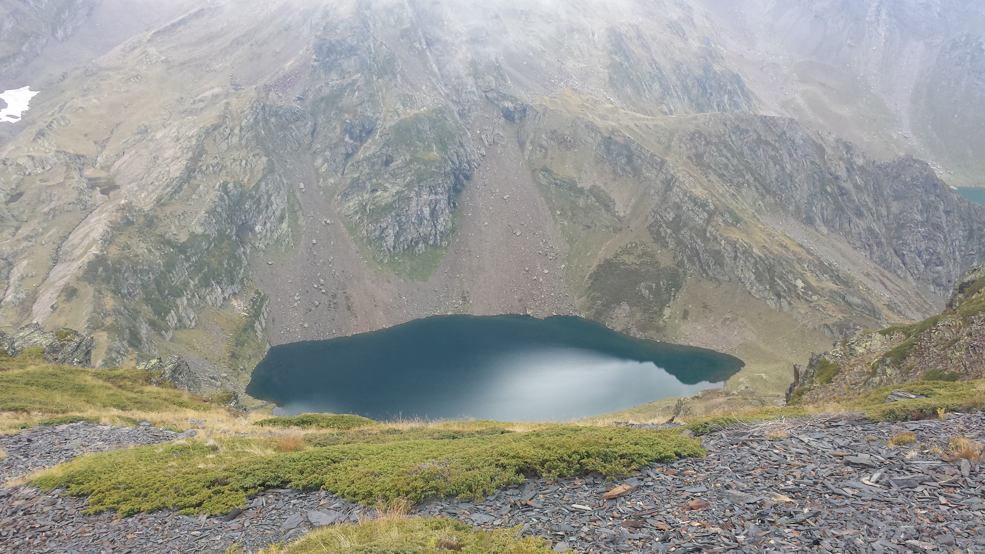 Le lac d'Uzious, vu depuis le pic Sanctus